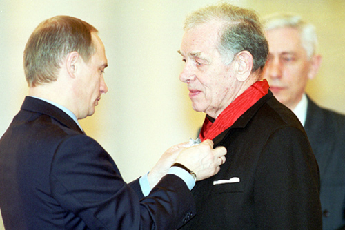 МОСКВА, БОЛЬШОЙ КРЕМЛЕВСКИЙ ДВОРЕЦ. Церемония вручения государственных наград. Орден «За заслуги перед отечеством» II степени вручается артисту Театра имени Моссовета Георгию Жженову.